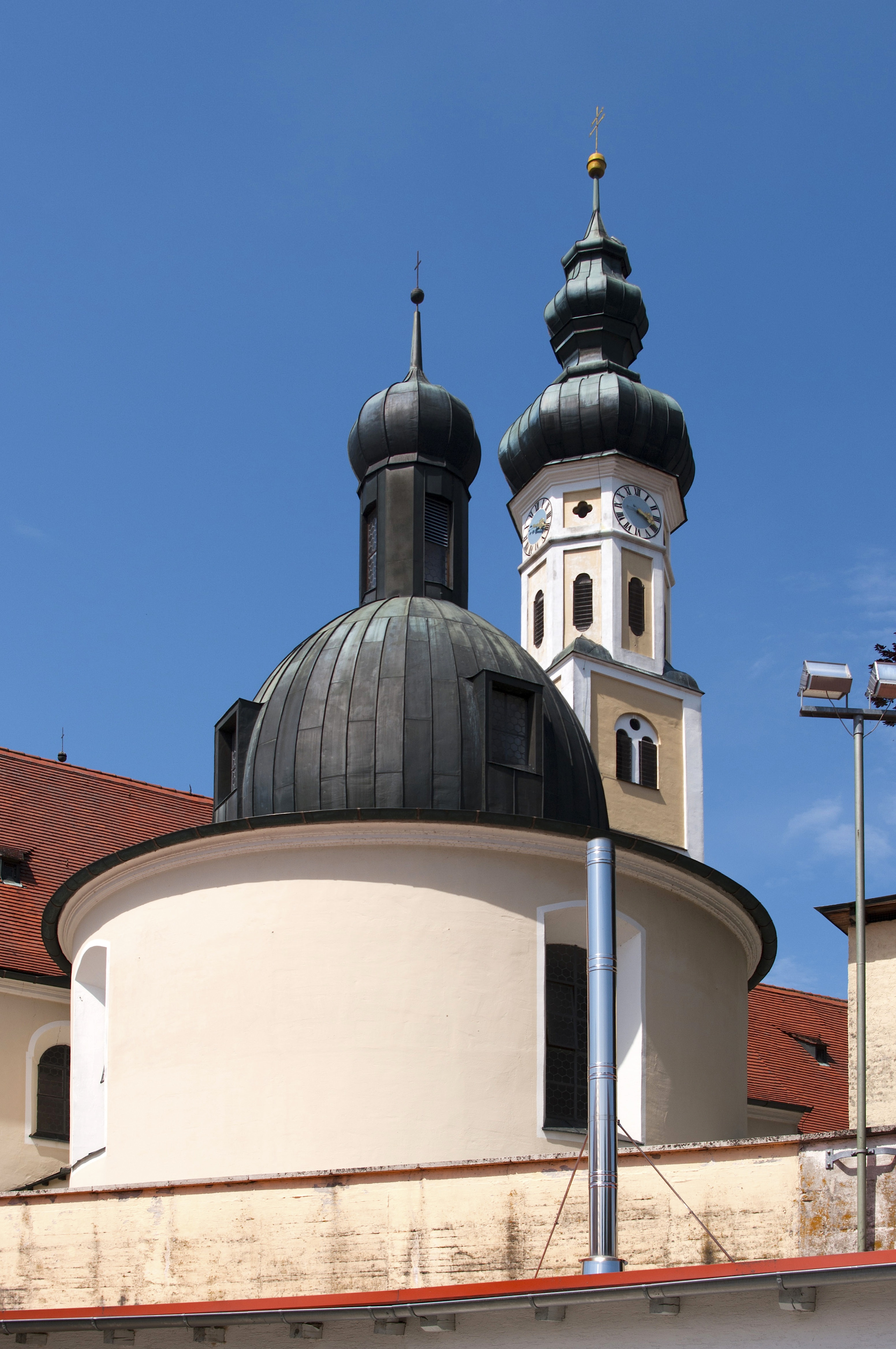 älteste Teile der Kirche aus dem 14./15. Jahrhundert, Umbau 1727/28, erneuter Umbau und Erweiterung 1958/59